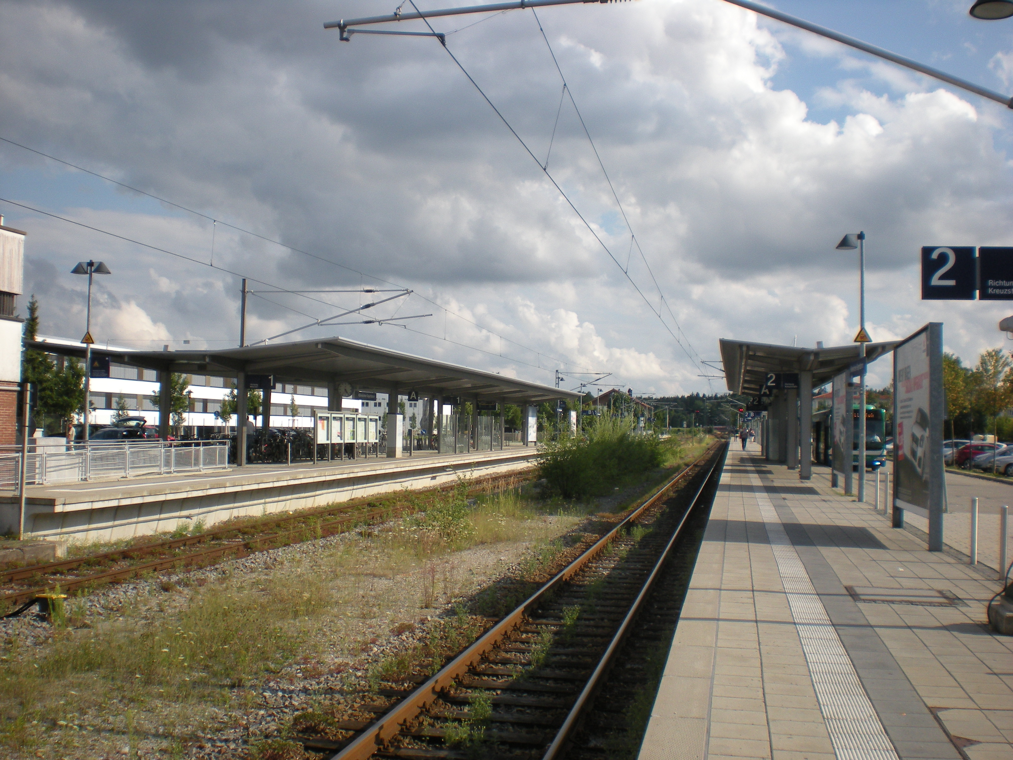 Seitenbahnsteige des S-Bahnhofs Höhenkirchen-Siegertsbrunn